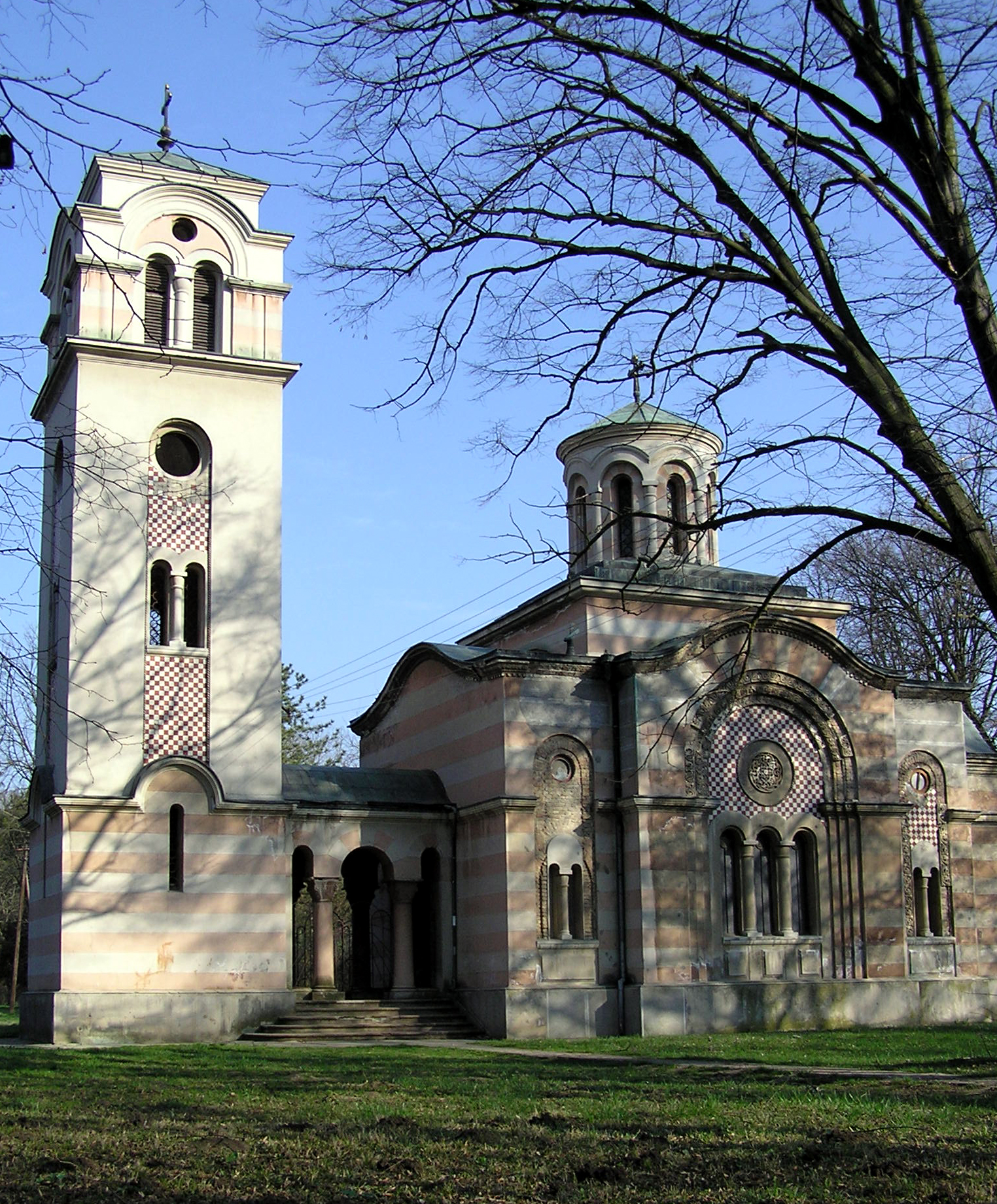 A kép a (történelmi Magyarország Baranya vármegye, baranyavári járás) főherceglaki uradalom ortodox kápolnáját ábrázolja